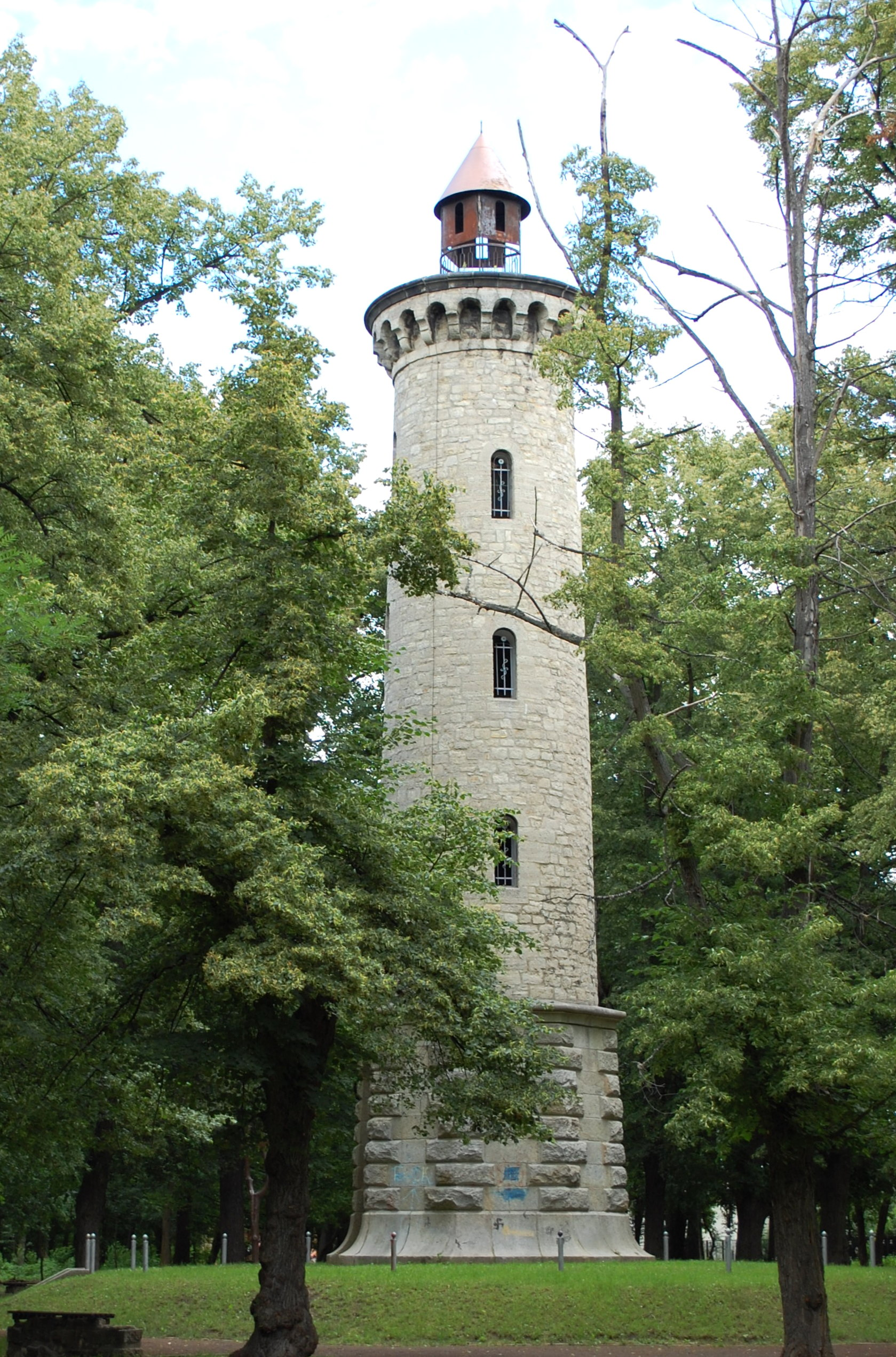 Bismarckturm in Quedlinburg